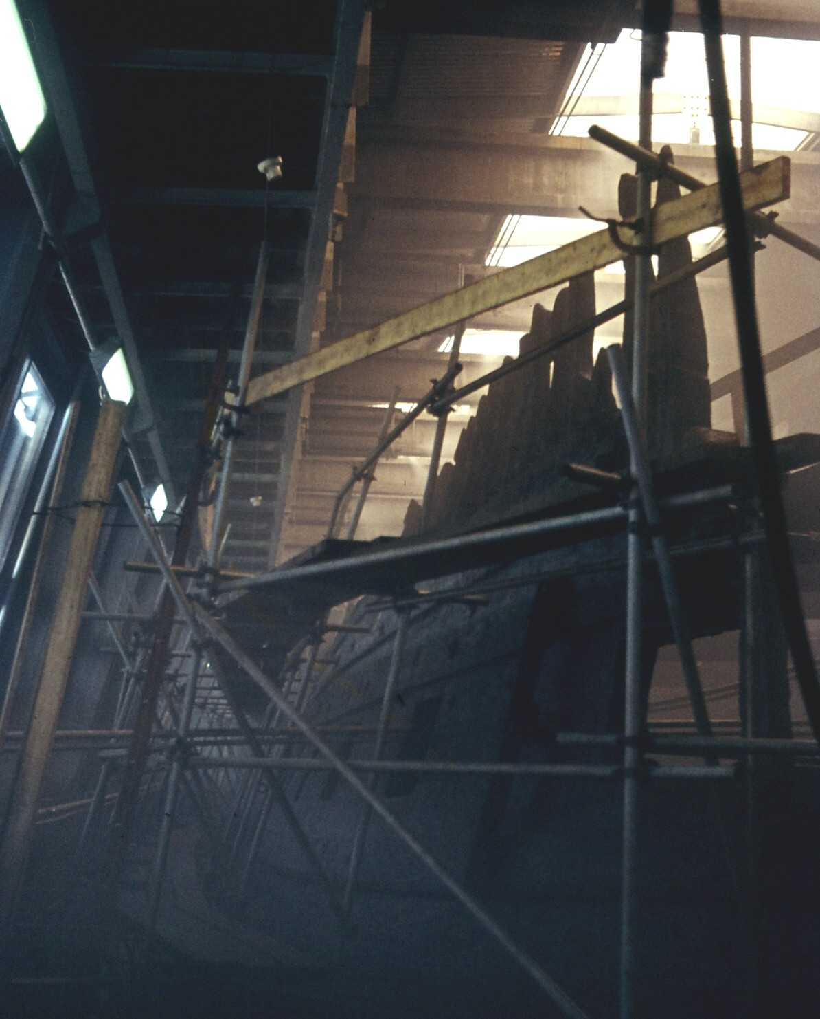 Regalskeppet Vasa under impregneringen 1963